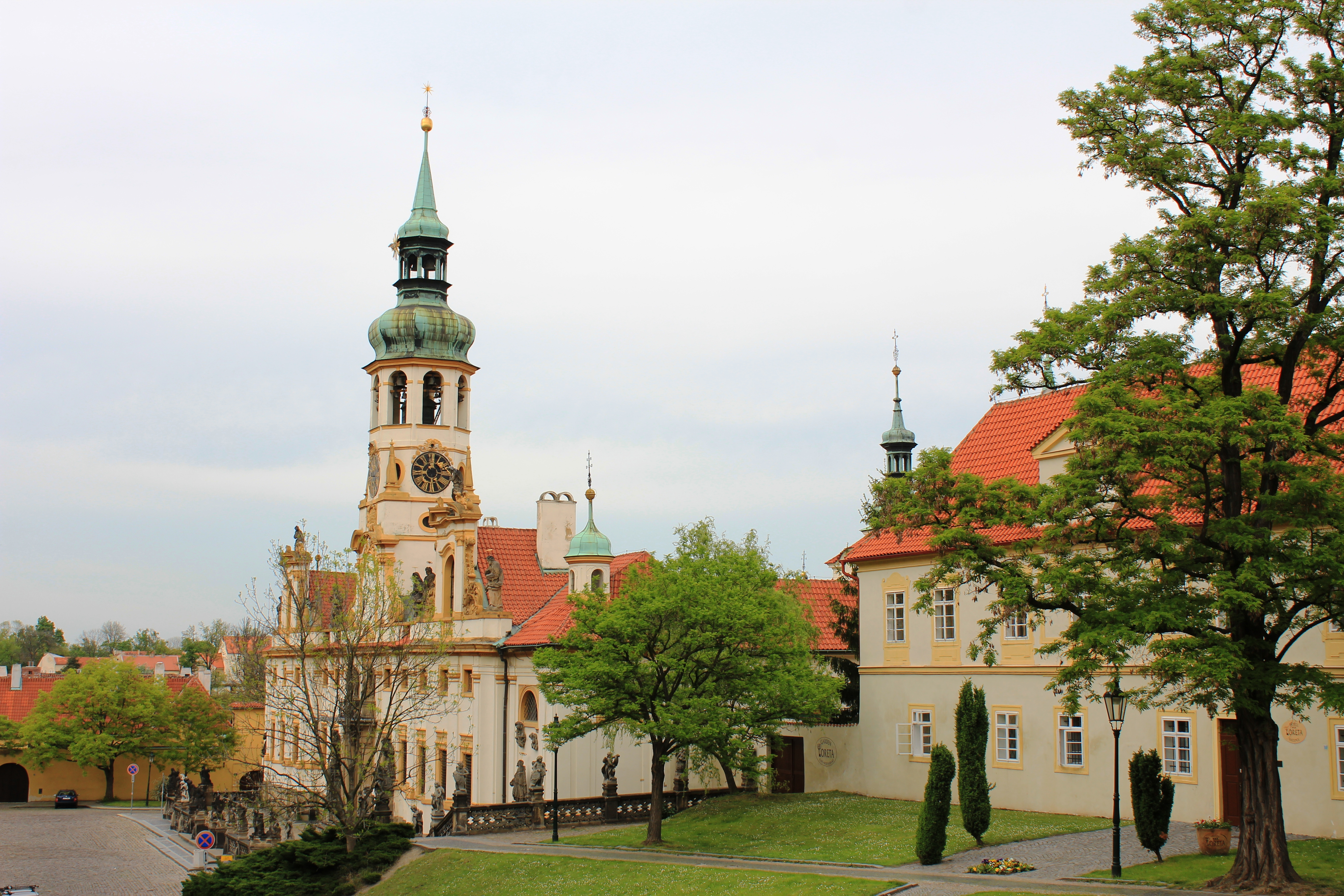 Loreta